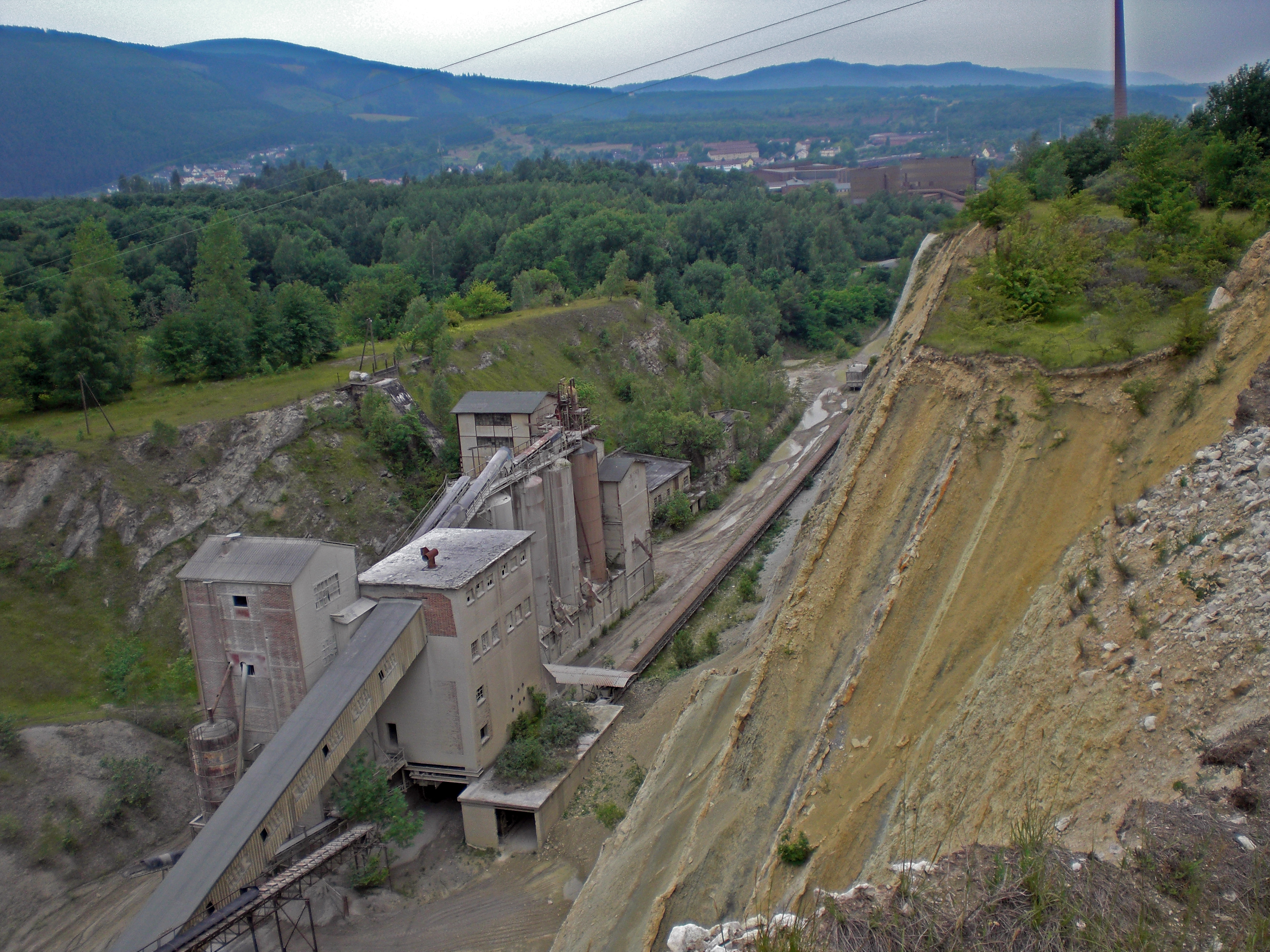 Steinbruch Oker bei Goslar